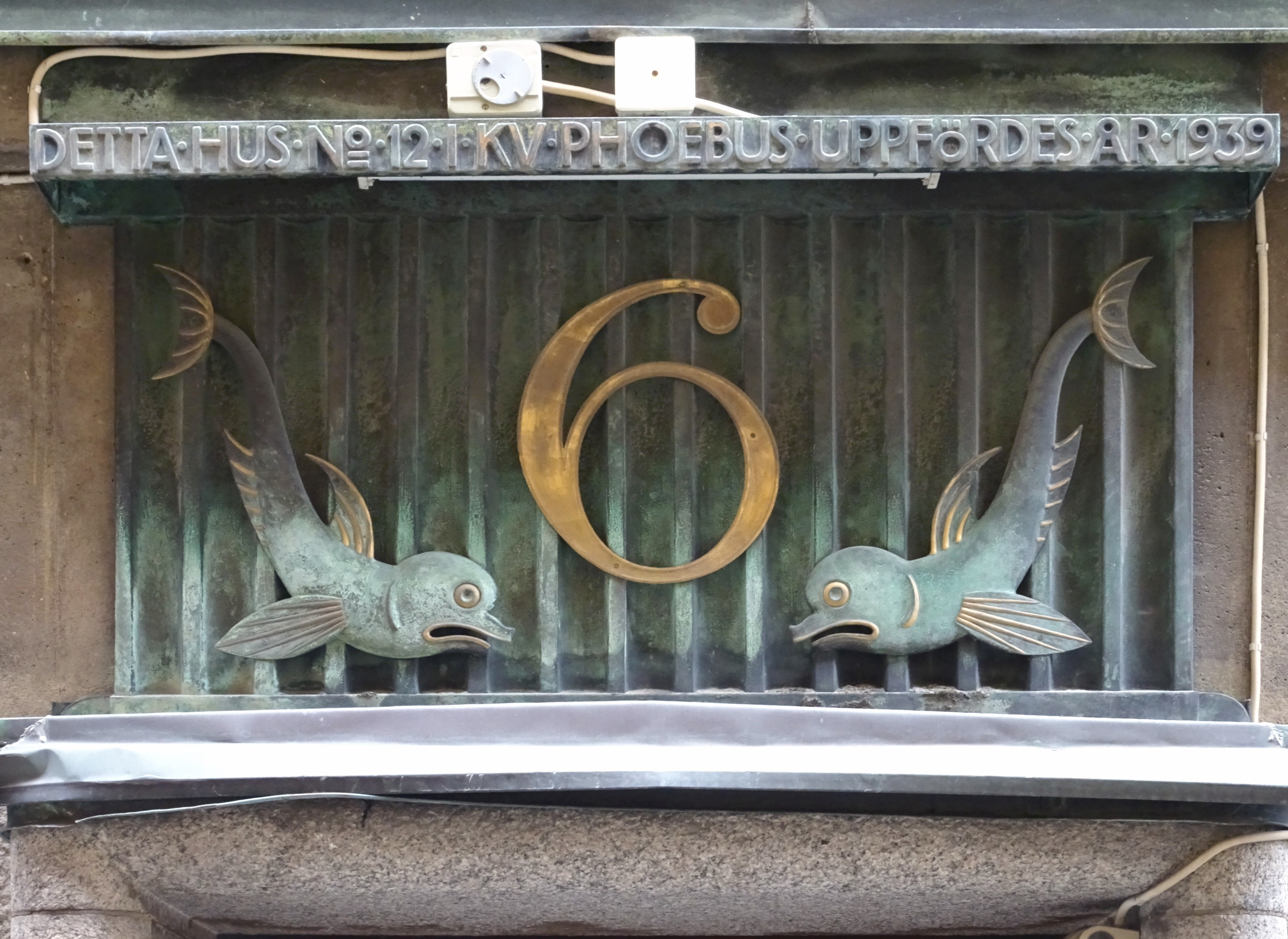 Packhusgränd nr 6